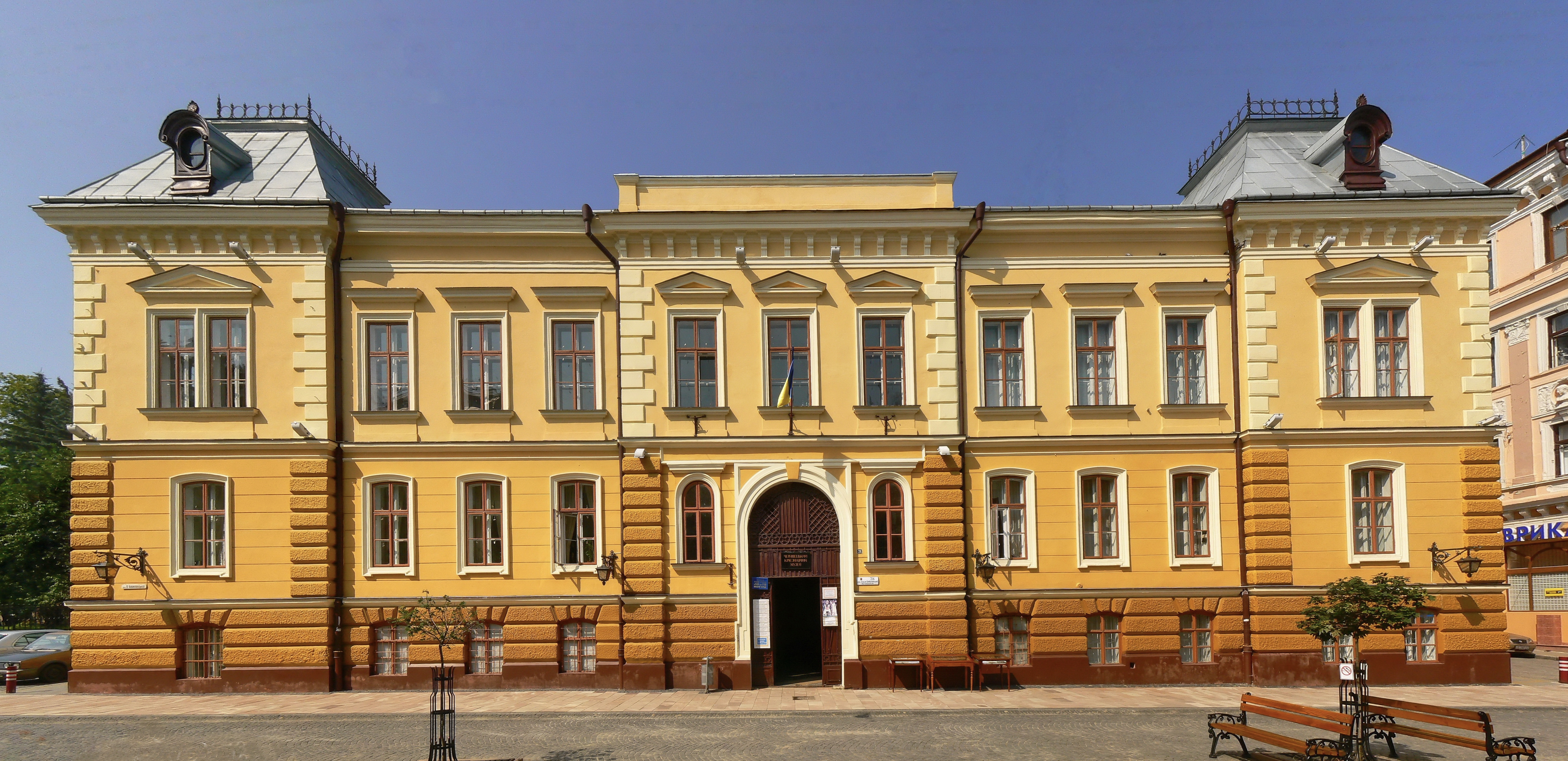 Чернівецький обласний краєзнавчий музей